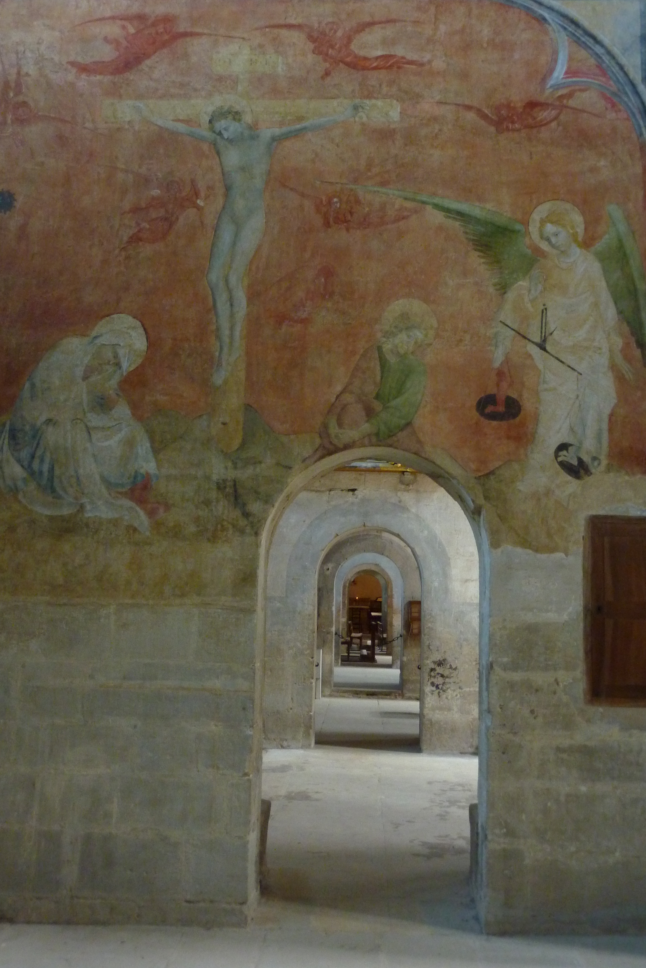 Abteikirche in Saint-Antoine-l’Abbaye